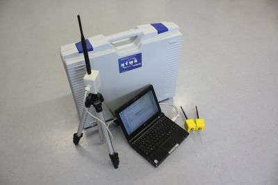 Kapillardruckmesssystem